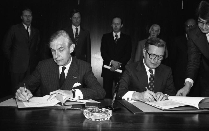 Unterzeichnung eines Abkommens über Zusammenlegung der Grenzabfertigung zwischen der Bundesrepublik Deutschland und den Niederlanden durch Staatssekretär Walter Gehlhoff und dem niederländischen Botschafter Diederic Wolter Baron van Lynden im Auswärtigen Amt.